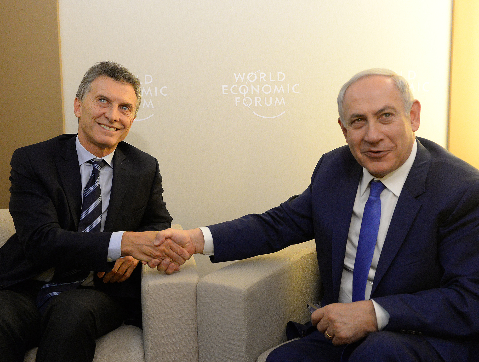 El presidente Mauricio Macri se reunió con el primer ministro de Israel, Benjamin Netanyahu.